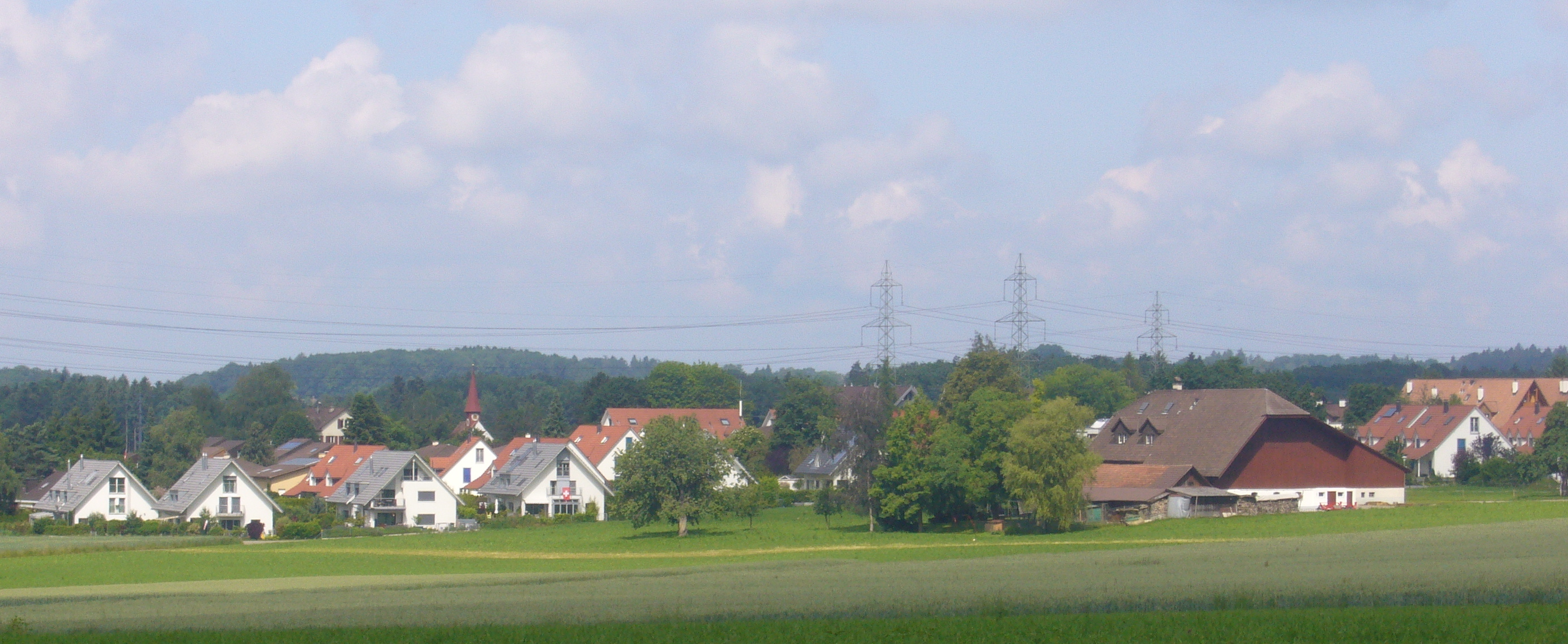 Breite bei Nürensdorf von Osten her gesehen.